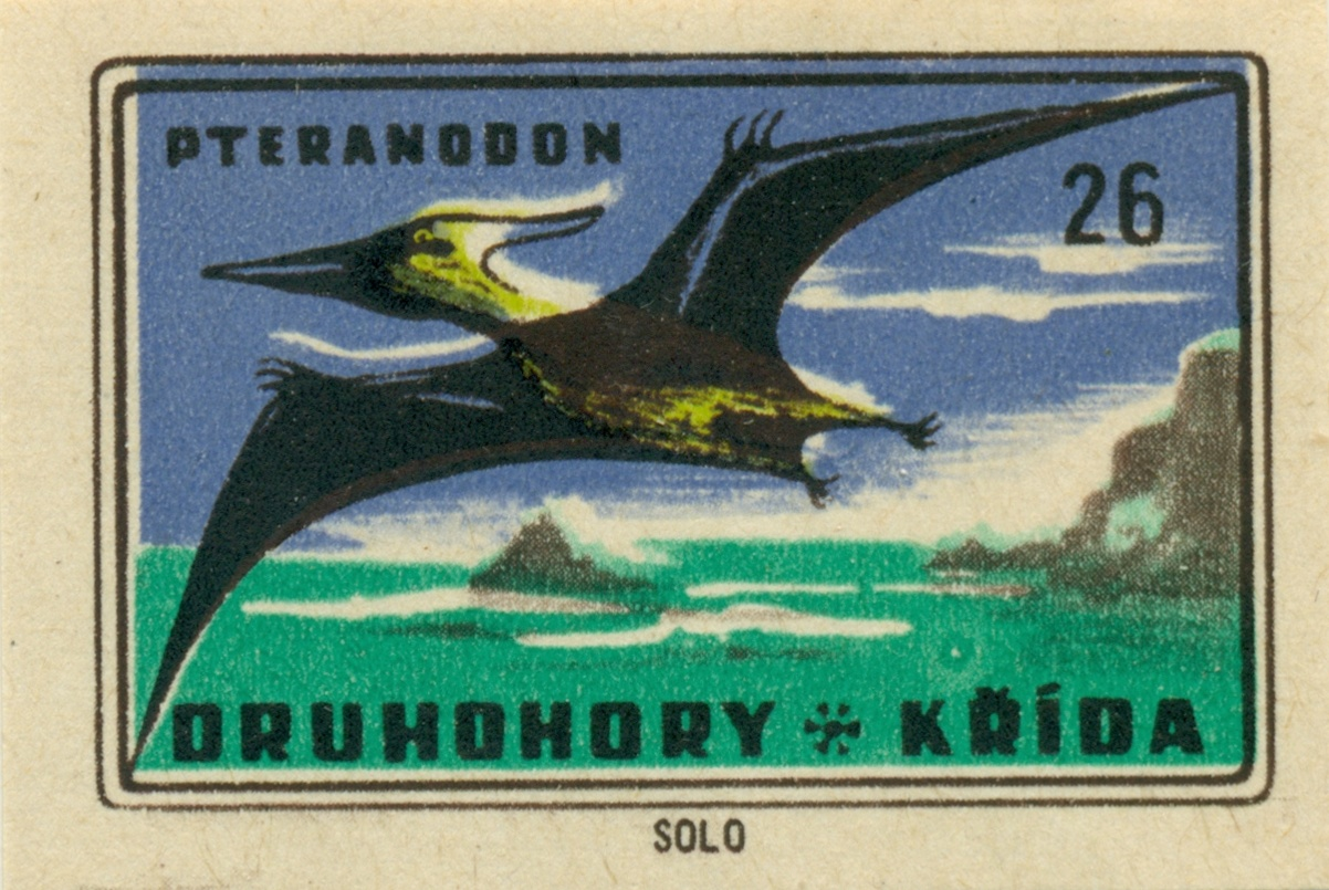 nálepka r. 1959